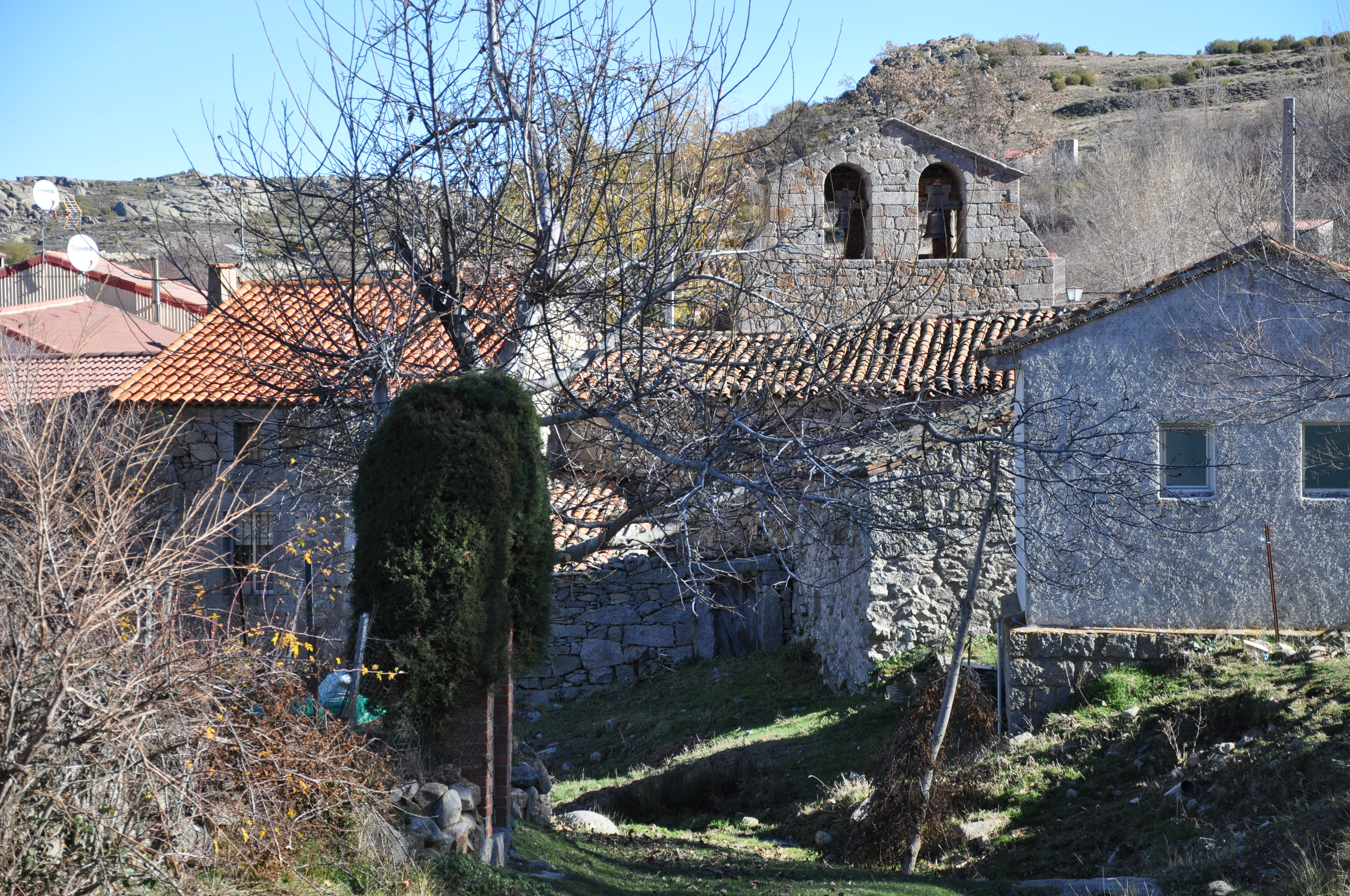 Panorama en Narrillos del Rebollar, Ávila, España